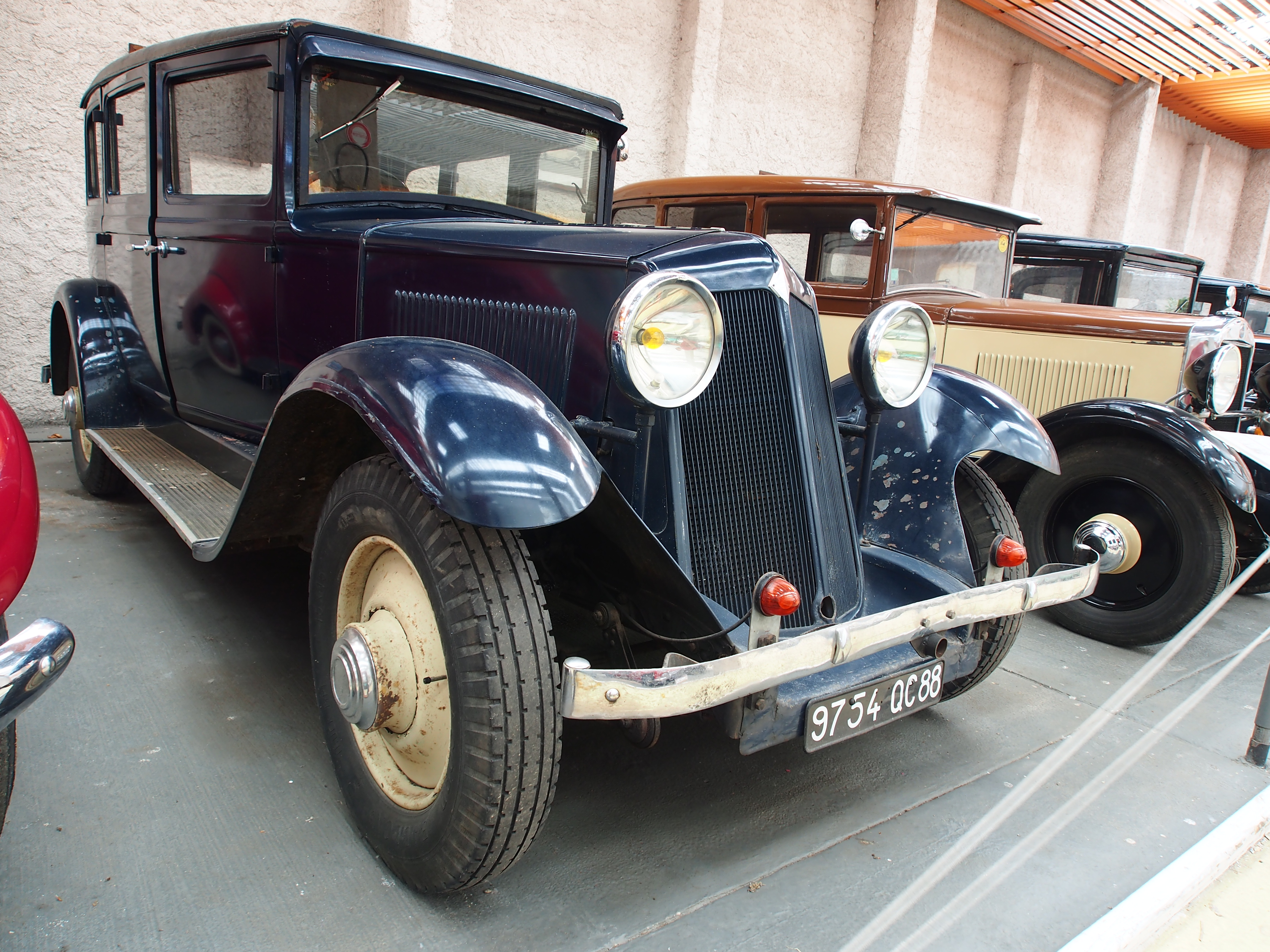 Photographed at the Association Lorraine des Amateurs d'Automobiles de collection et de loisirs.